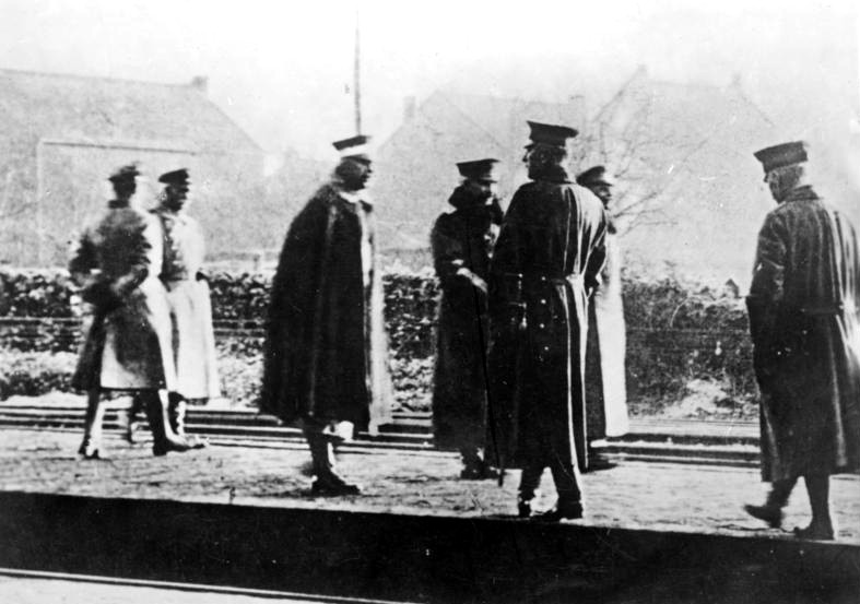 Flucht Wilhelms II. 1918 Am 10. November 1918 flüchtete Wilhelm II. nach seiner Abdankung auf holländisches Gebiet. UBz: Wilhelm II. verabschiedet sich am belgisch-niederländischen Grenzübergang Eysden von seinem Gefolge.